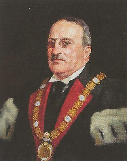 Porträt von Oskar Primavesi (1874–1952), Rektor der Technischen Hochschule Wien